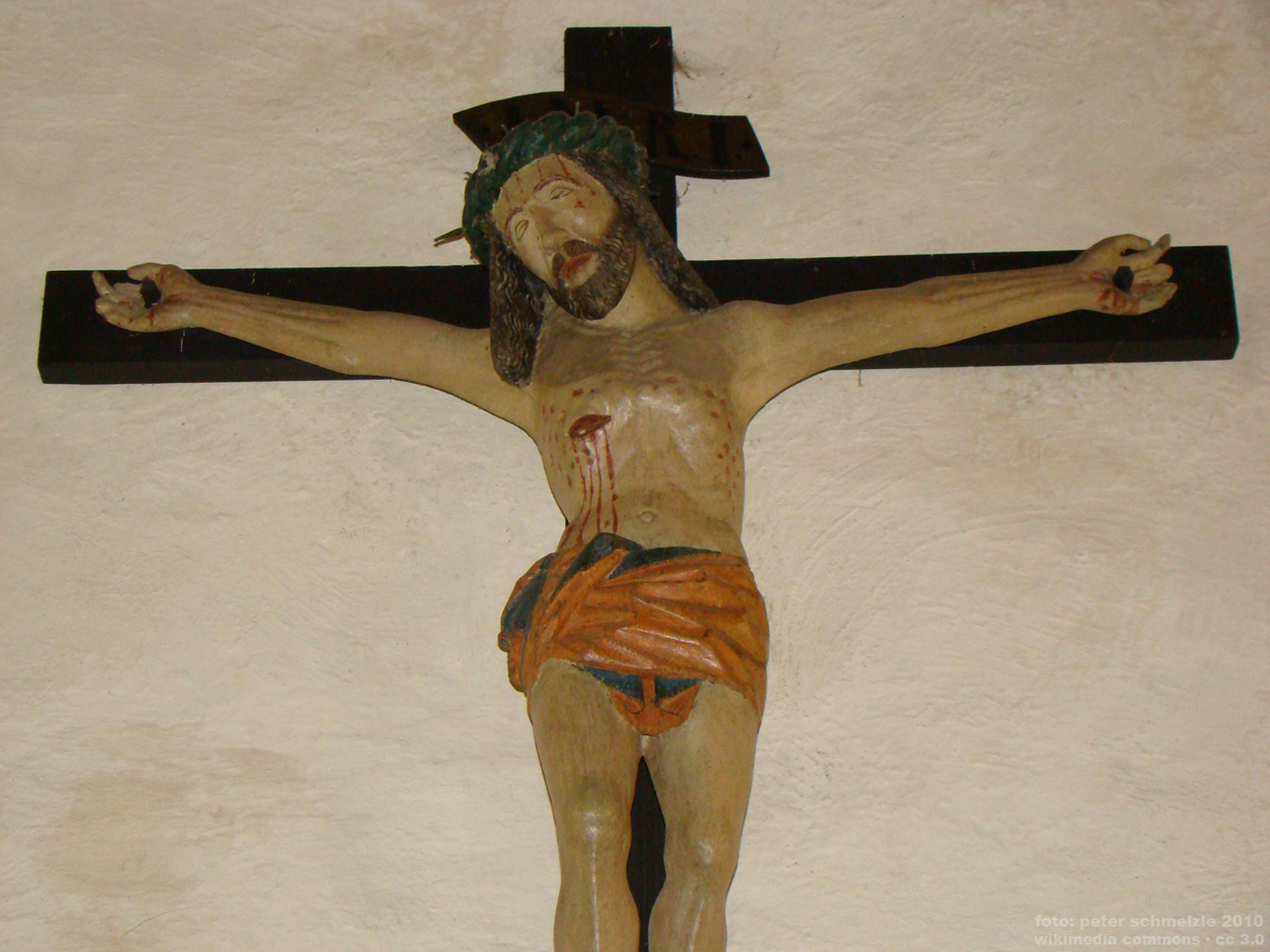 Kruzifix in der Gangolfskapelle in Neudenau